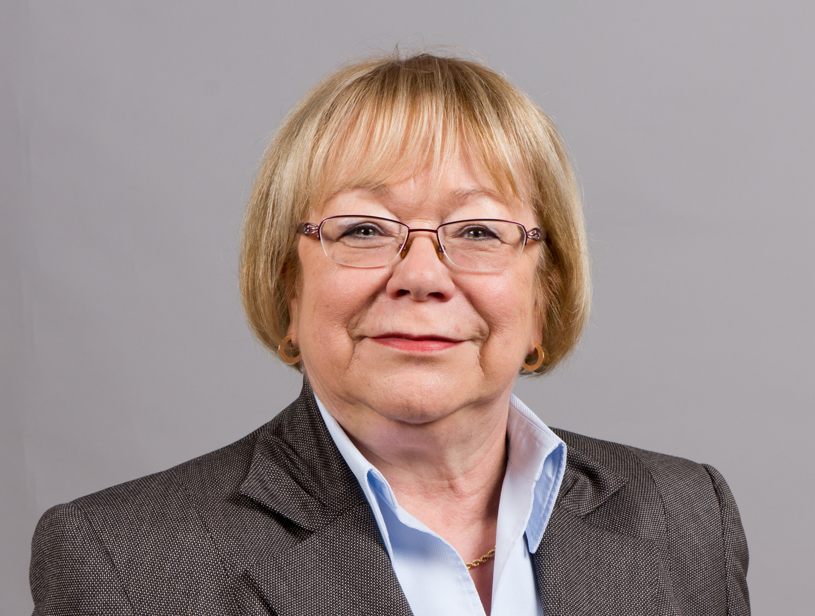 Hannelore Klamm (* 13. Januar 1944 in Ludwigshafen) ist eine deutsche Politikerin (SPD) und Mitglied des Landtages von Rheinland-Pfalz. Landtag Rheinland-Pfalz 2014 19. bis 20. Februar 2014 in MainzDieses Foto wurde im Rahmen des Projektes „WIKI loves parliaments/Landtag Rheinland-Pfalz“ erstellt. Fragen zur Nachnutzung Wenn Sie Fragen zur Nachnutzung dieses Bildes haben, können Sie sich jederzeit gern an wenden